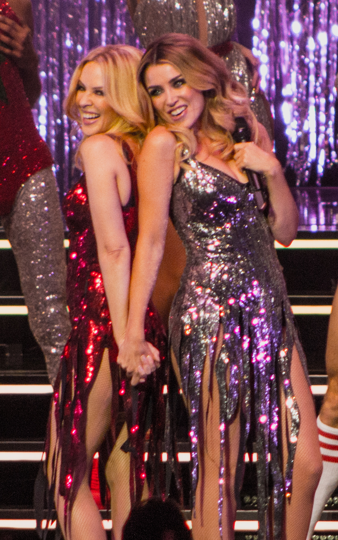 KylieRAH111215-28